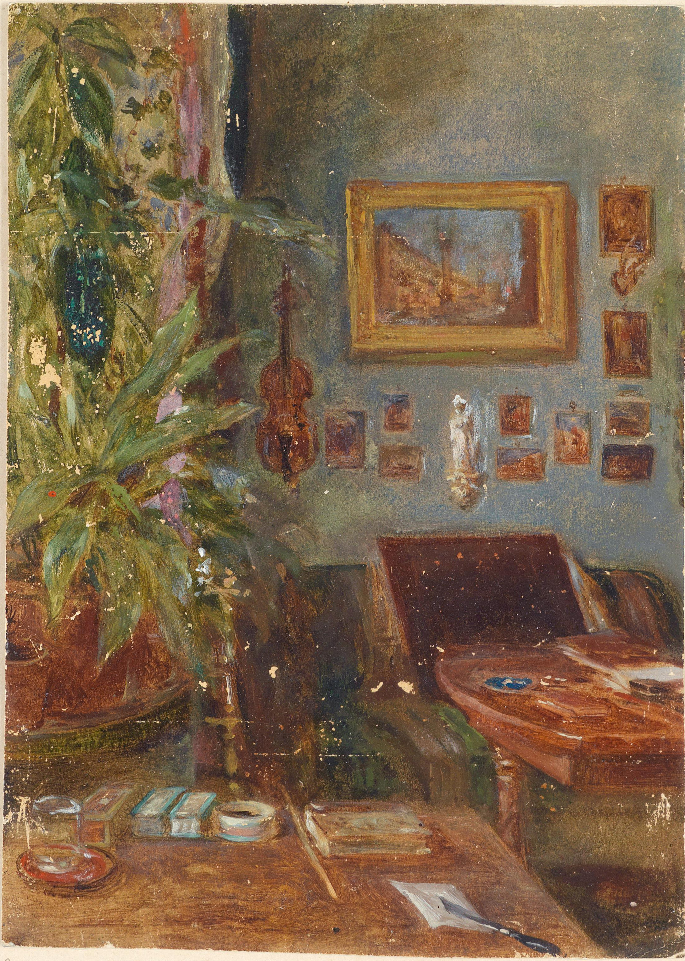 "Arbeitszimmer", Blick in das Atelier Rudolf von Alts. Aquarell auf Karton, 19 x 14